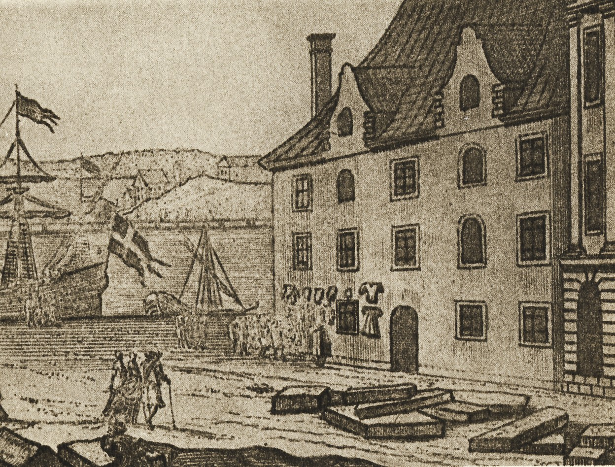 Skeppsbon 2, "Saltkompaniets hus"